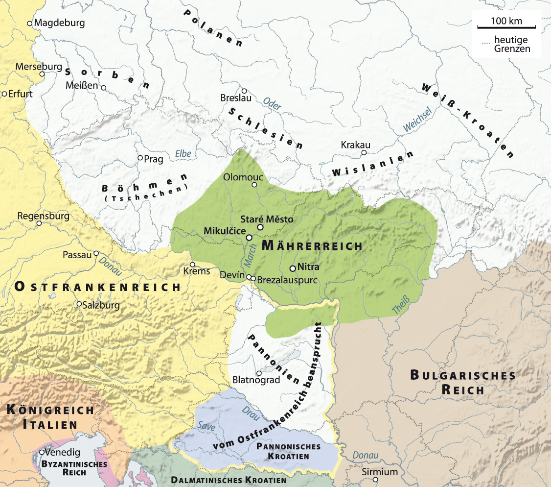 Karte des Mährerreichs unter Rastislav Die Darstellung der Gewässer entspricht dem heutigen Stand.